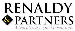 Logo-Renaldy and Partners Law Firm